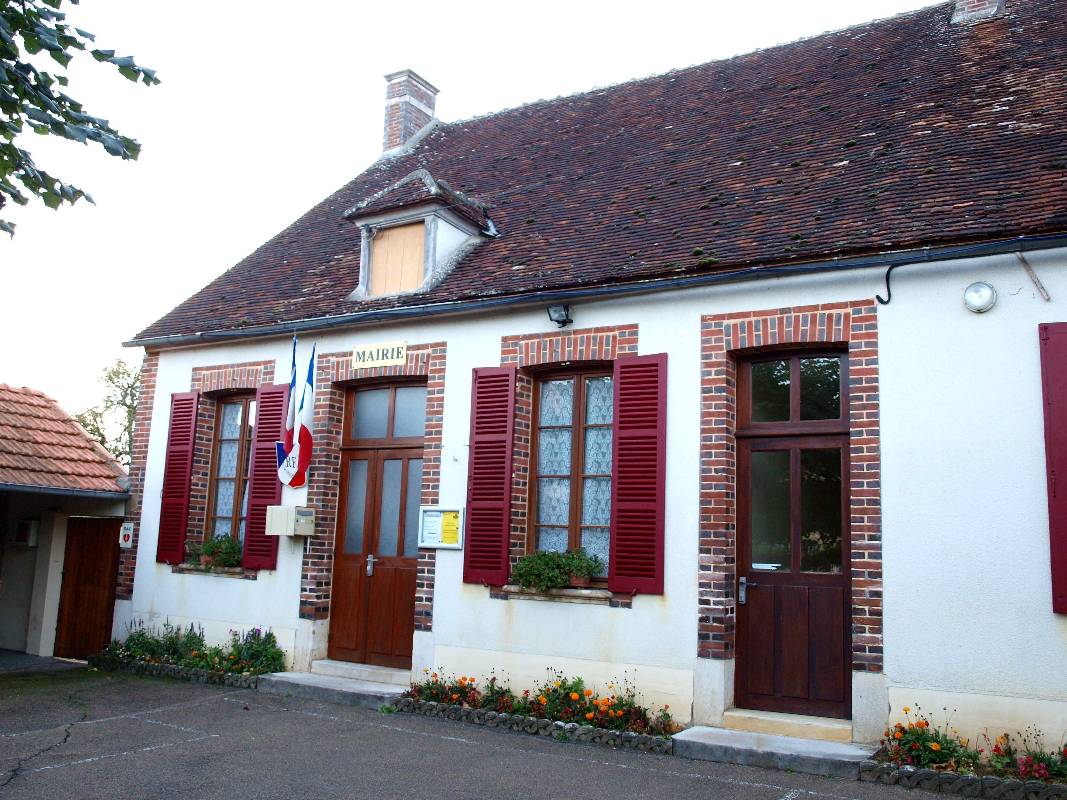 Beauvoir (Yonne, France) ; mairie-école